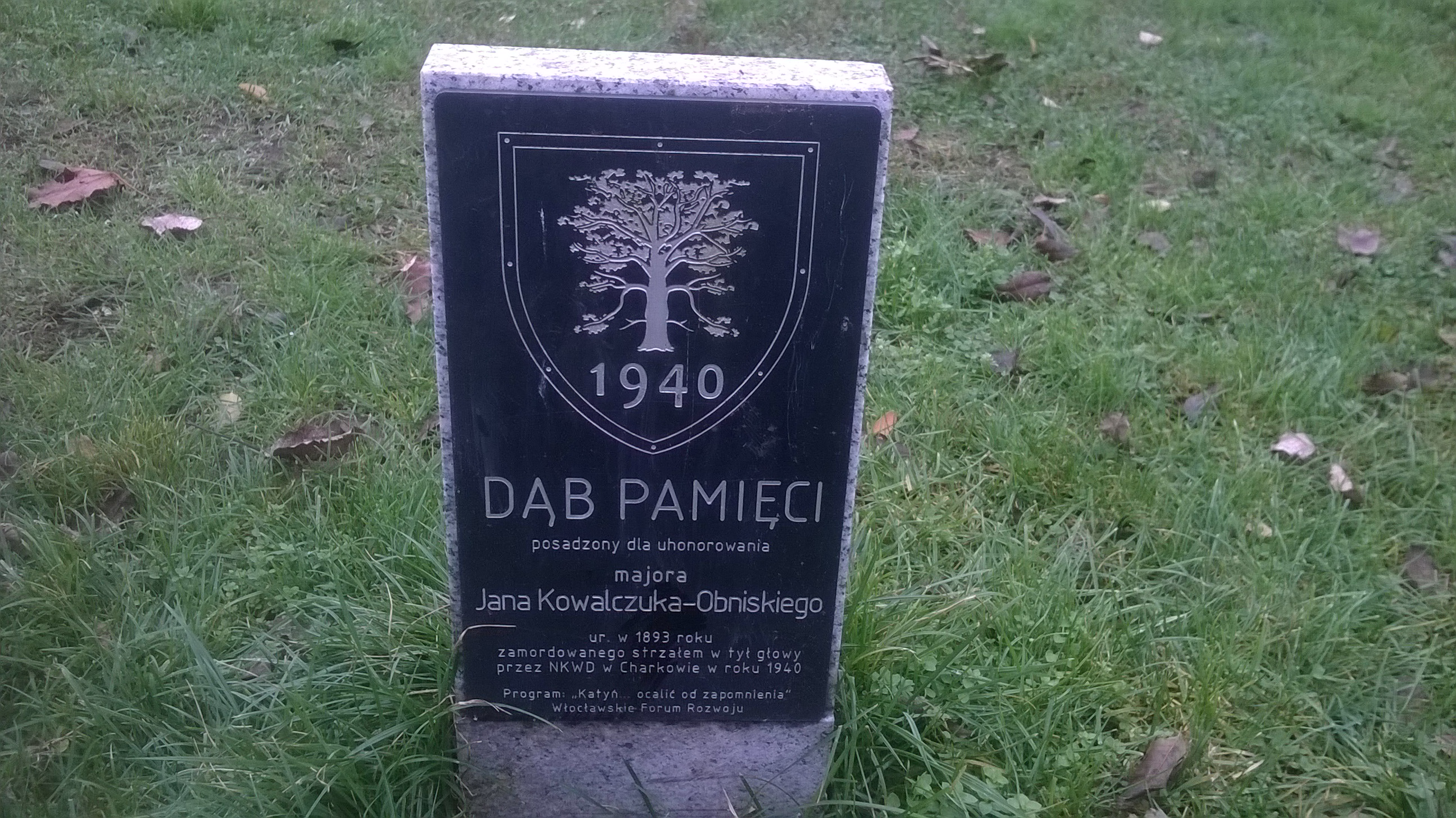 Katyński Dąb Pamięci mjr. Jana Kowalczuk-Obniskiego. Włocławek - Park im. Władysława Łokietka.